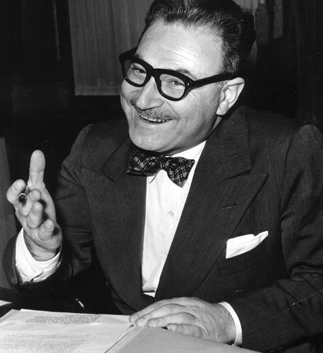 Rogelio Frigerio en los años 50